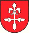 Wappen der Gemeinde Bad Blumau